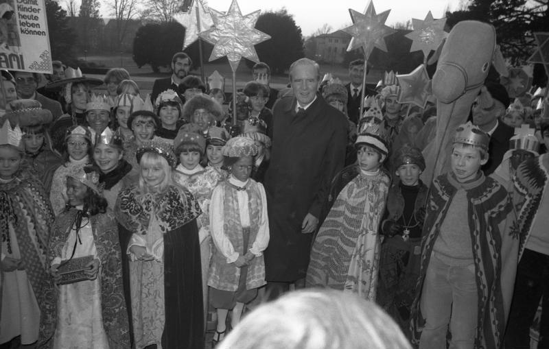 Bundespräsident Karl Carstens empfängt Sternsinger